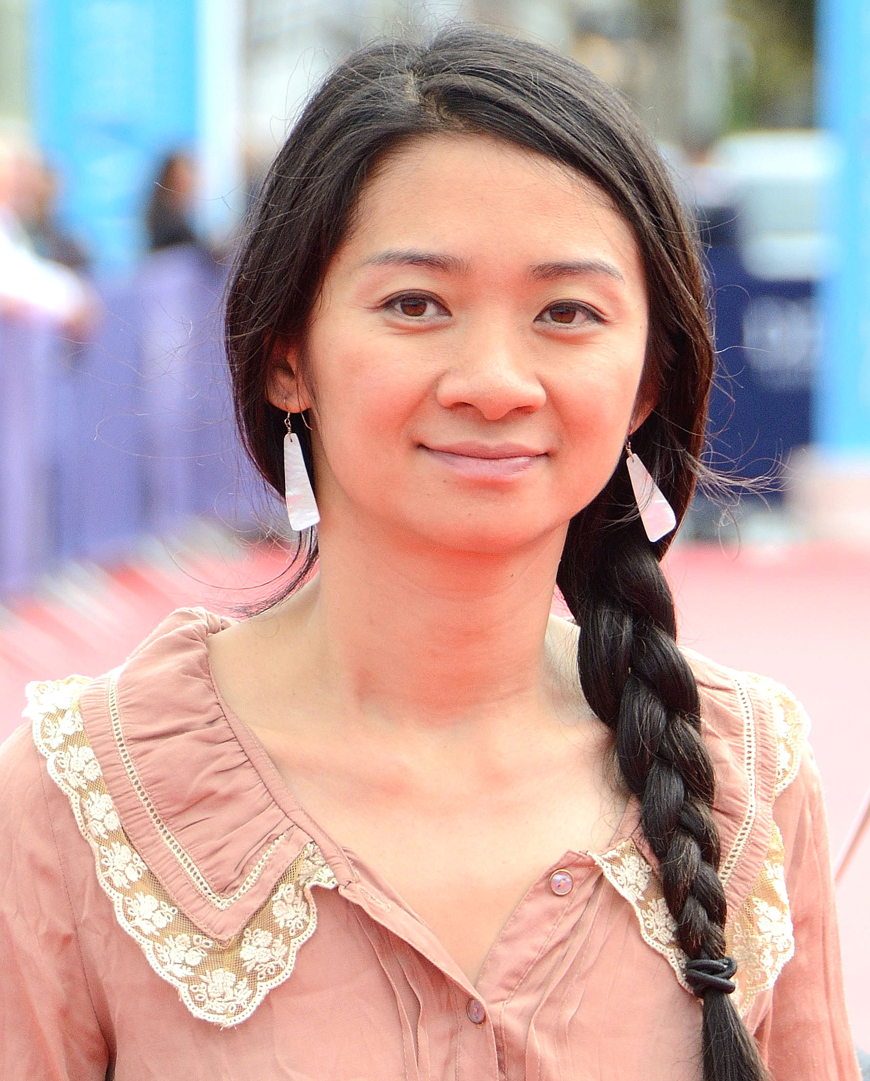 chloe zhao à deauville